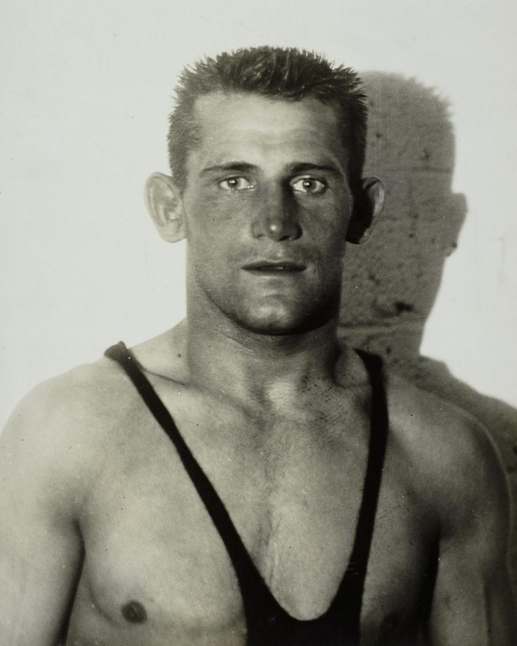 Olympische Spelen Amsterdam, 1928 : Olympisch kampioen Grieks/Romeins worstelen tot 62 kg, De Est Woldemar Wäli.